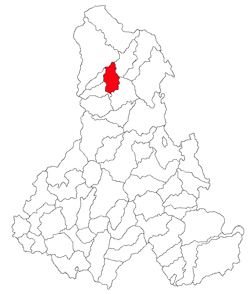 Categorie:Hărţi ale judeţului Harghita Contents 1 Licensing 2 Sursă 3 Licensing 4 Original upload log Licensing Sursă ro::Imagine:Harta_jud_Harghita.png